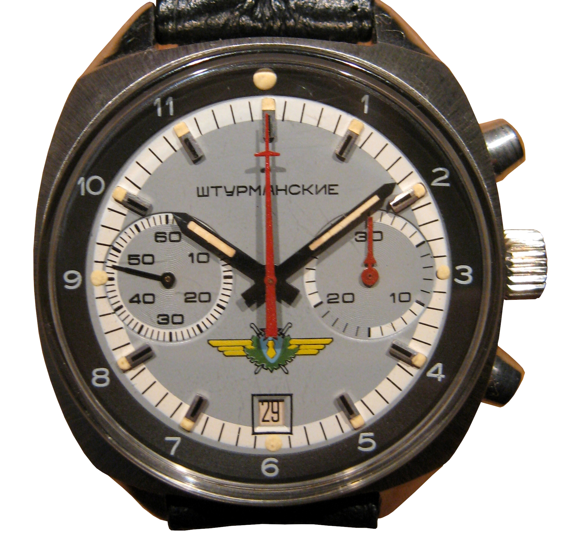 Poljot Fliegerchronograph "Sturmanski". Eine Uhr dieses Typs trug Juri Gargarin beim ersten bemannten Weltraumflug. Datum: 19.03.2011 Urheber: M. Pfeiffer alias Benutzer:Gordito1869 Quelle: privates Fotoarchiv des Urhebers